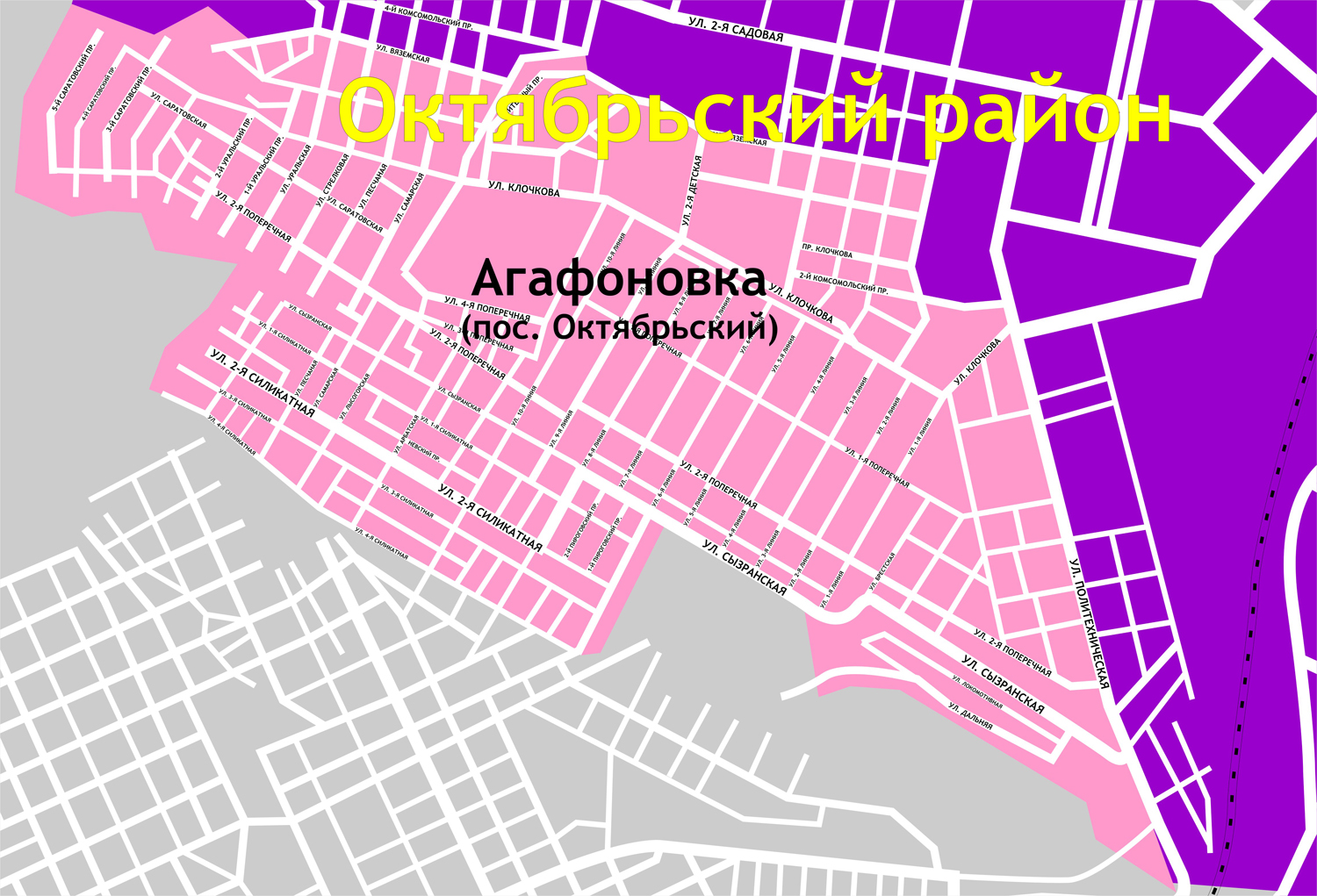 География Агафоновки